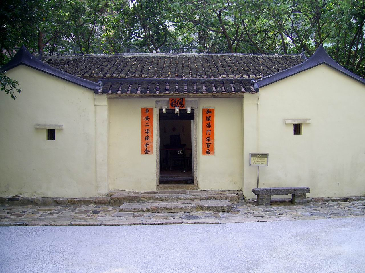 中文（香港）: 羅屋